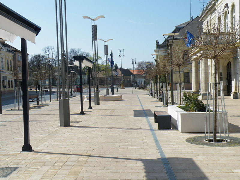 A felújított Civitas Fortissima tér Balassagyarmaton